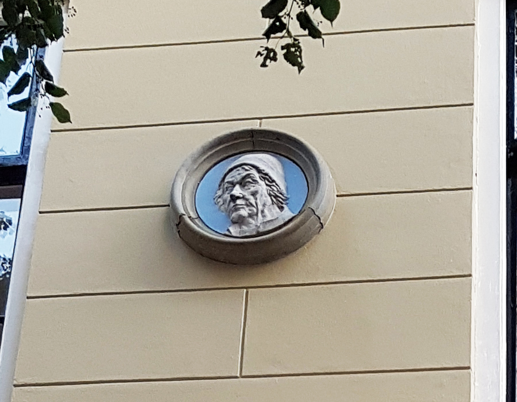 Deze medaillon toont een fantasieportret van Alexander Hegius; over zijn werkelijke uiterlijk is niets bekend. Alexander Hegius was de bekendste rector aan de Latijnse School. Hij introduceerde er Grieks en trok trok honderden leerlingen van heinde en ver. Het medaillon bevindt zich op de voormalige Latijnse School te Deventer aan het Grote Kerkhof. Het werd in 1992 bij de renovatie van het pand geplaatst en is van de hand van Ela Venbroek-Franczyk.